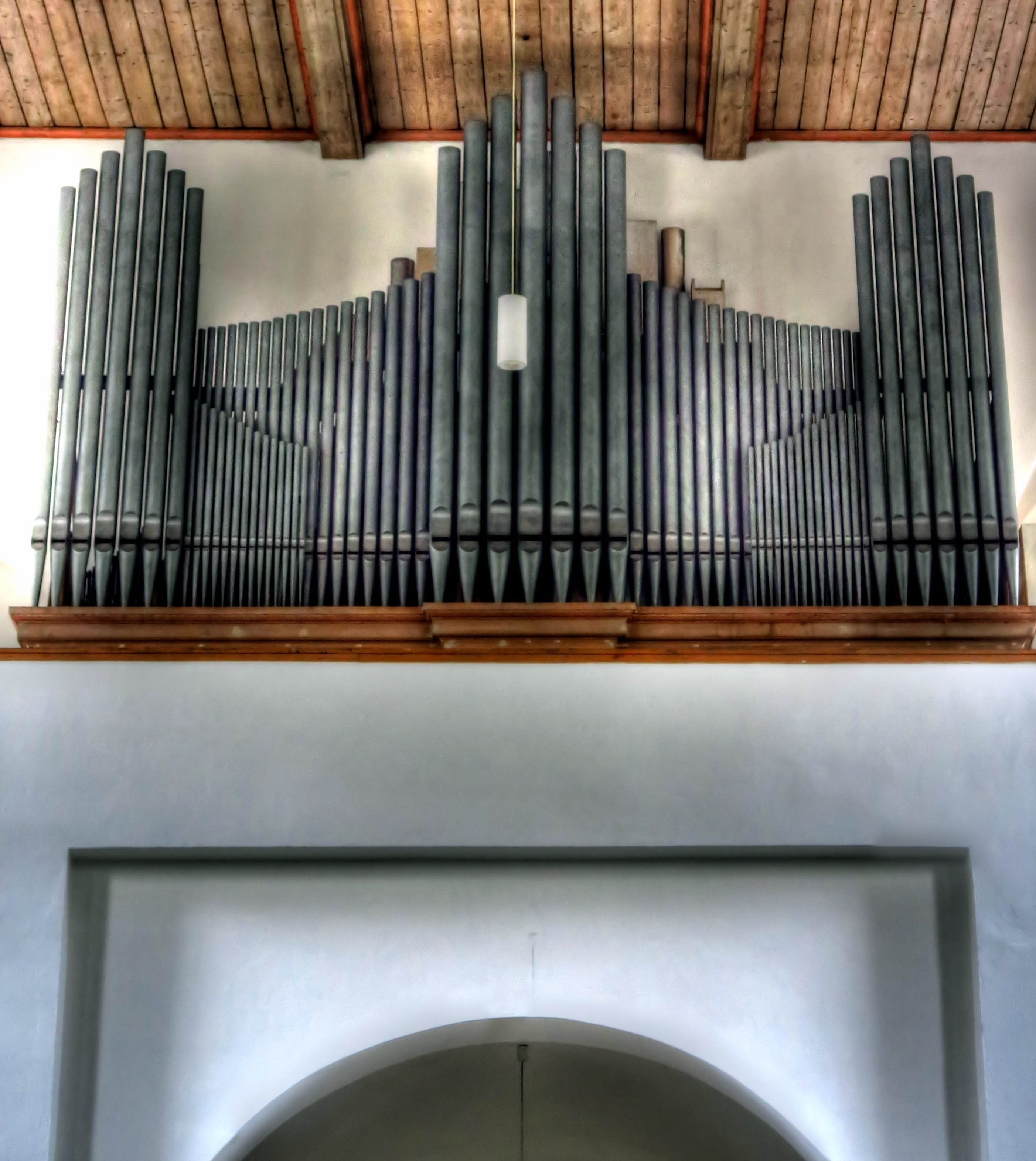 Deutschland, Bayern, München, Schwanthalerhöhe, Kirche St. Benedikt, Orgel